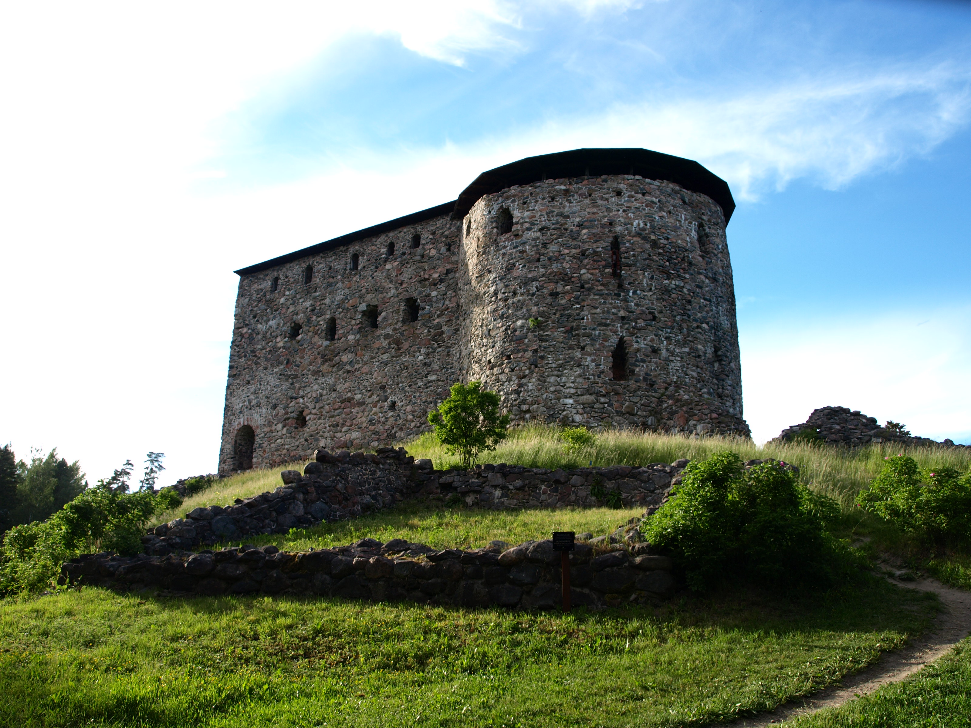 Die Burgruine Raseborg bei Snappertuna (Südfinnland)